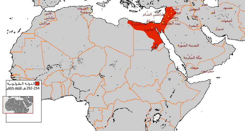 خارطة تُظهر حُدود الدولة الطولونيَّة ضمن الحُدود السياسيَّة المُعاصرة للوطن العربي.